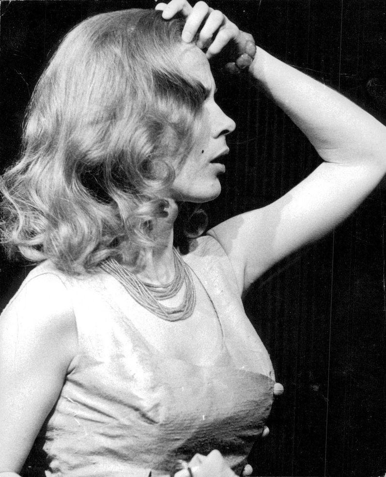 Bibi Andersson som Maggie i "Efter syndafallet".Den med stort intresse emotsedda premiären av Arthur Millers skådespel "Efter syndafallet" ägde rum på fredagskvällen på Dramatens lilla scen. "Pjäsen är Millers första allvarliga kraftsamling på åtta, nio år", skriver Per Erik Wahlund i sin recension och fortsätter, "och om han inte fått moraliskt mod att genomgå psykoterapi som konceptionen måste ha utgjort, är det tänkbart att hela hans dramatik skulle varit ett avslutat kapitel." "Efter syndafallet" blev framför allt en strålande framgång för Bibi Andersson, som gestaltar Maggie, blondinen i telefonväxeln som avancerar till stjärna i underhållningsbranschen.